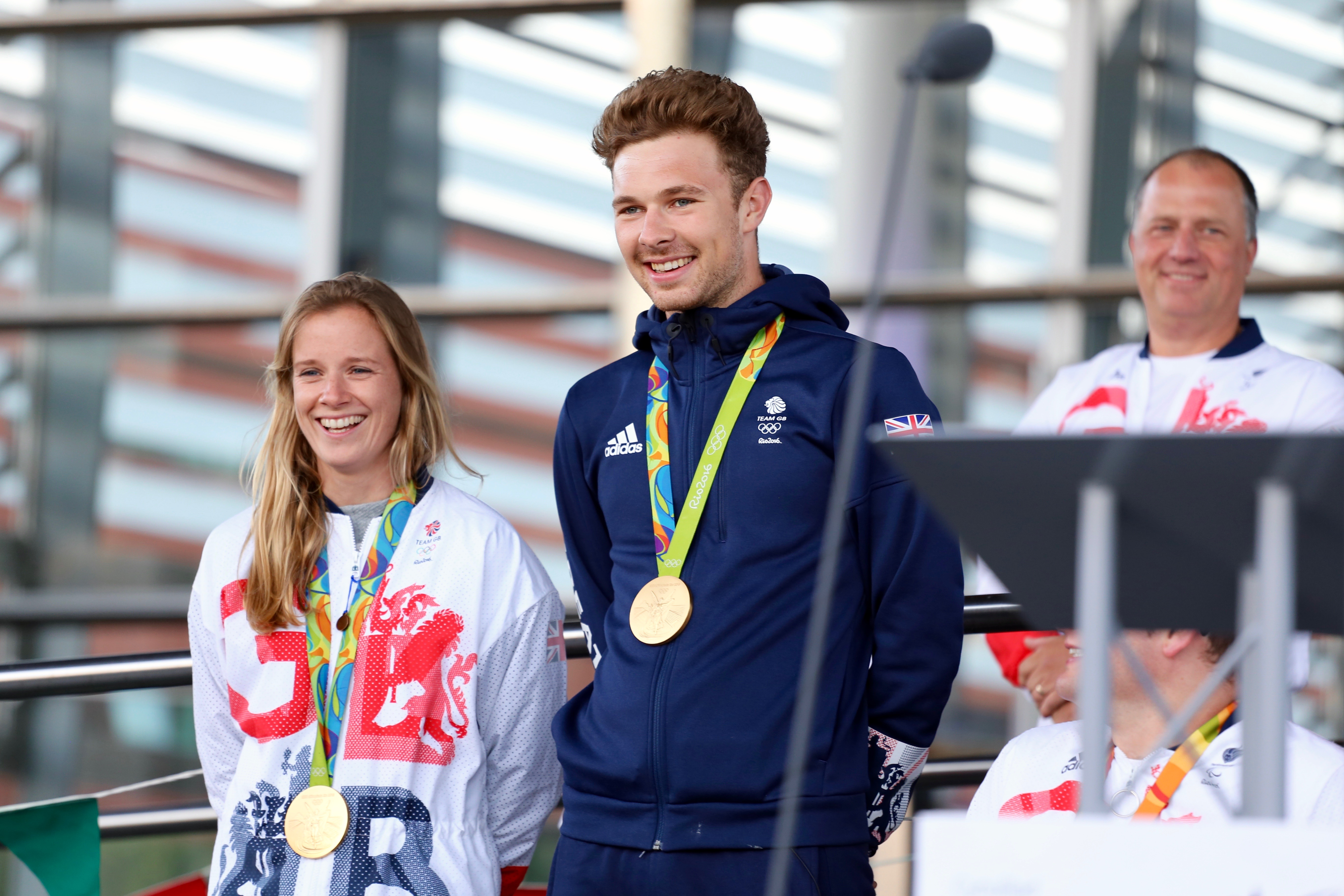 Hannah Mills, Owain Doull